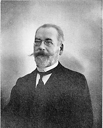 Оскар Бёттгер